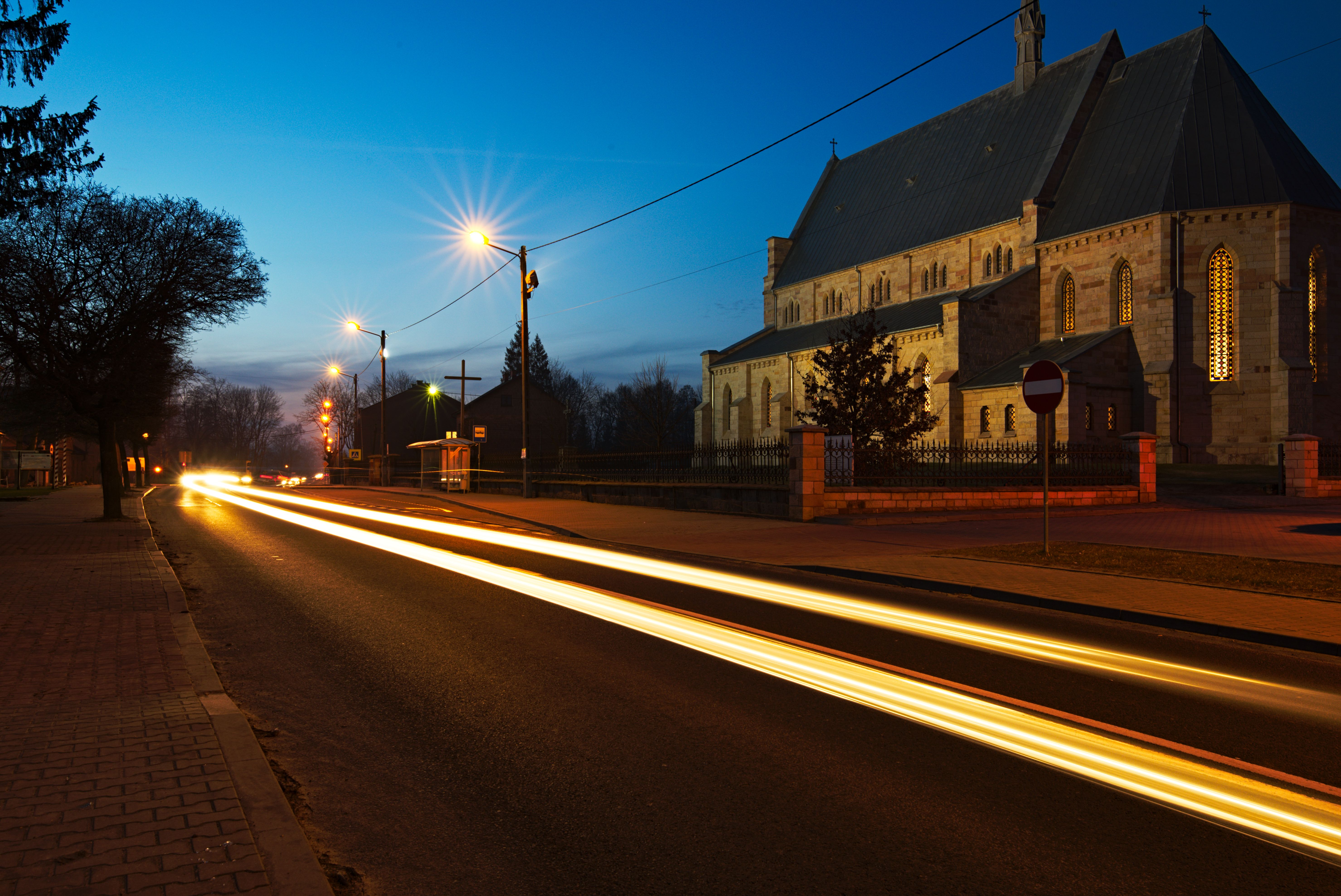 Kościół w Bliżynie Nocą 271 from 27.04.2009.